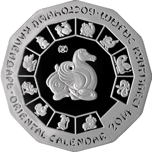 Год лошади